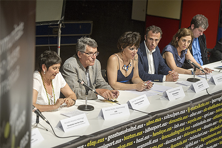 Joan Mari Torrealdai PuntuEUS Fundazioko lehendakaria. fundazioko Asanblada zuzentzen